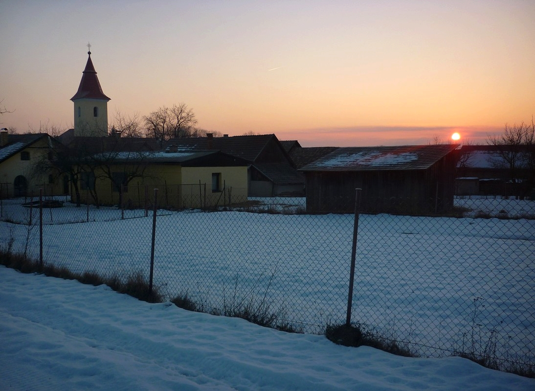 Ráno pri kostole